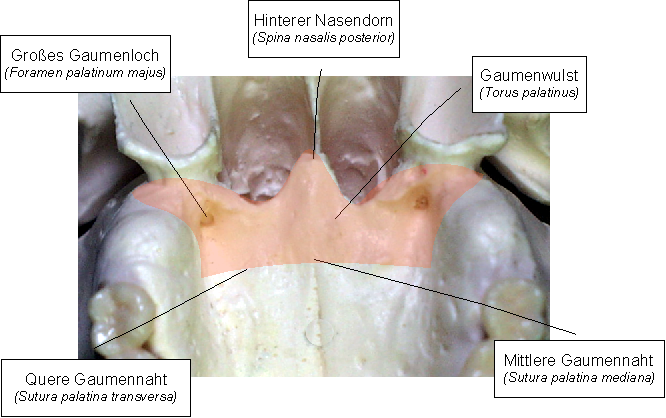 Abbildung des menschlichen Gaumenbeins